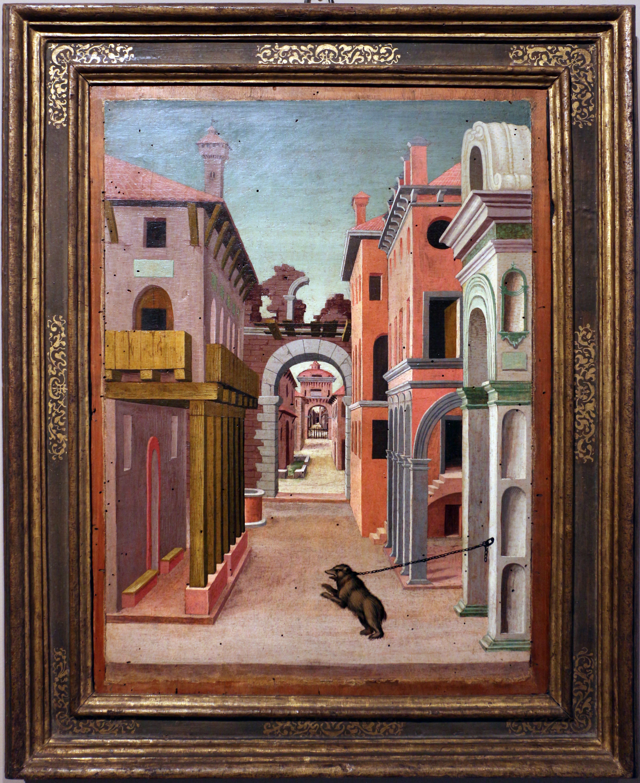 Palazzo dei Diamanti (Ferrara) This is a photo of a monument which is part of cultural heritage of Italy.